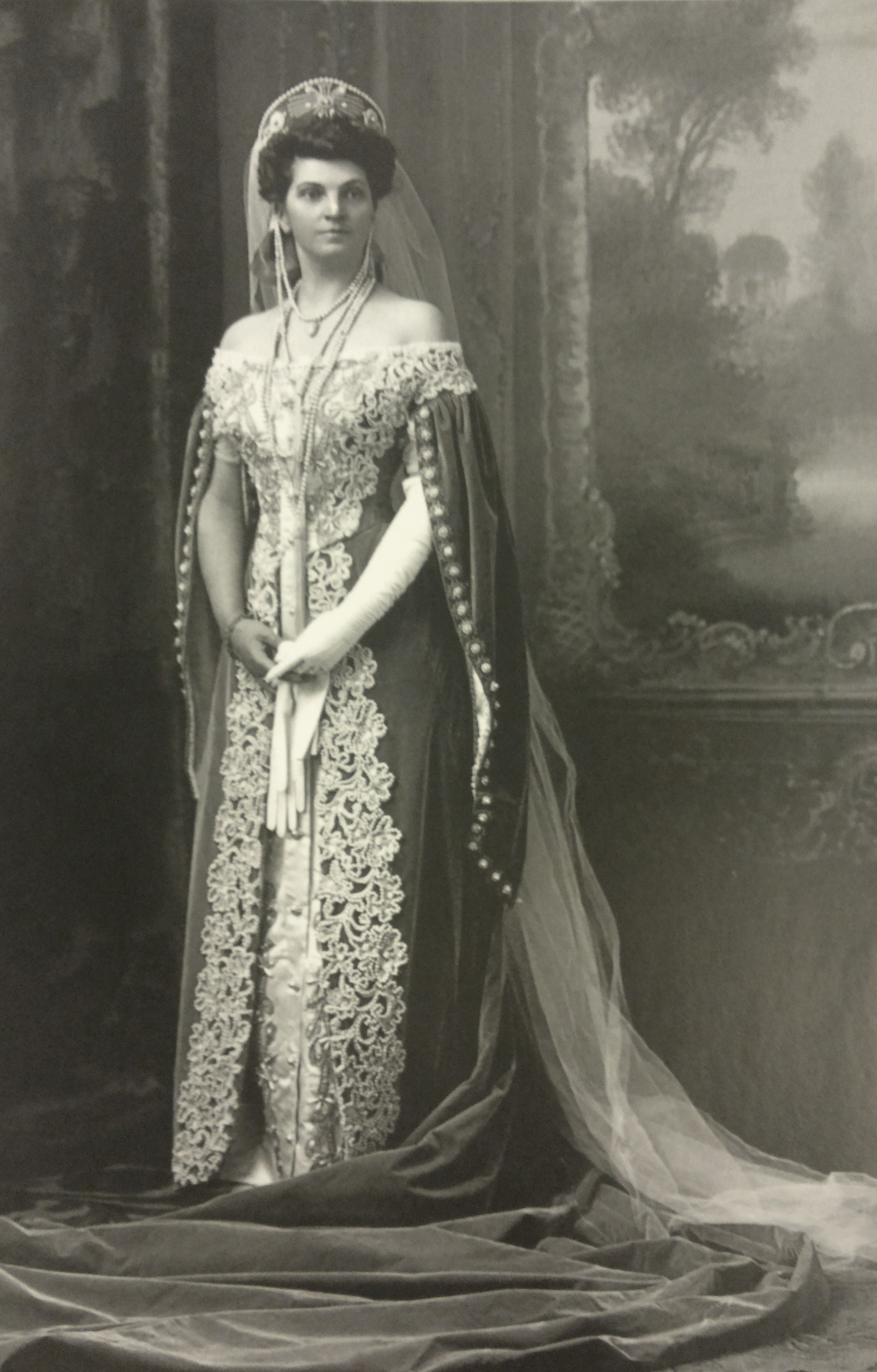 Александра Александровна Чаплина, урожденная фон Галлер